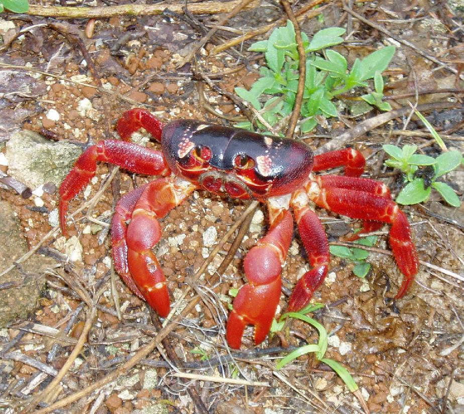 Weihnachtsinsel-Krabbe